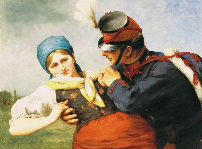 Greguss Imre: Udvarlás